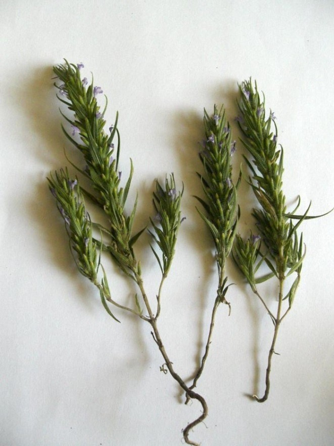 نام علمی :( ZIzphora tenuior l)کاکوتی گیاهی است علفی ، یکساله و دارای ساقه کوتاه به ارتفاع 5-10 سانتی متر . برگهای آن باریک ، نوک تیز و دارای میان گره های کوتاه است. گل های کوچک ، به رنگ بنفش کمرنگ یا بنفش مایل به ارغوانی دارد. مهمترین خواص درمانی آن در تقویت معده ، افزایش اشتها، رفع کردن سوءهاضمه ، ضد عفونی کردن مجاری تنفسی ، تقویت بینایی ، رفع نفخ می باشد.از دم کرده این گیاه جهت ضد سرفه و سرماخوردگی استفاده می‌شود این گیاه از کوههای گونی و تپه ماهورها تهیه می‌گردد.